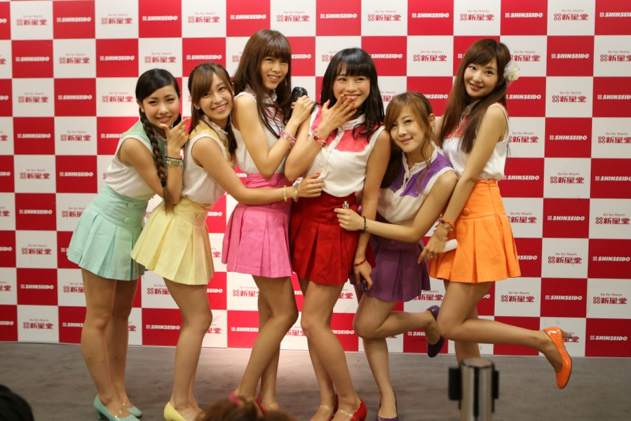 新星堂でのa.no.ne